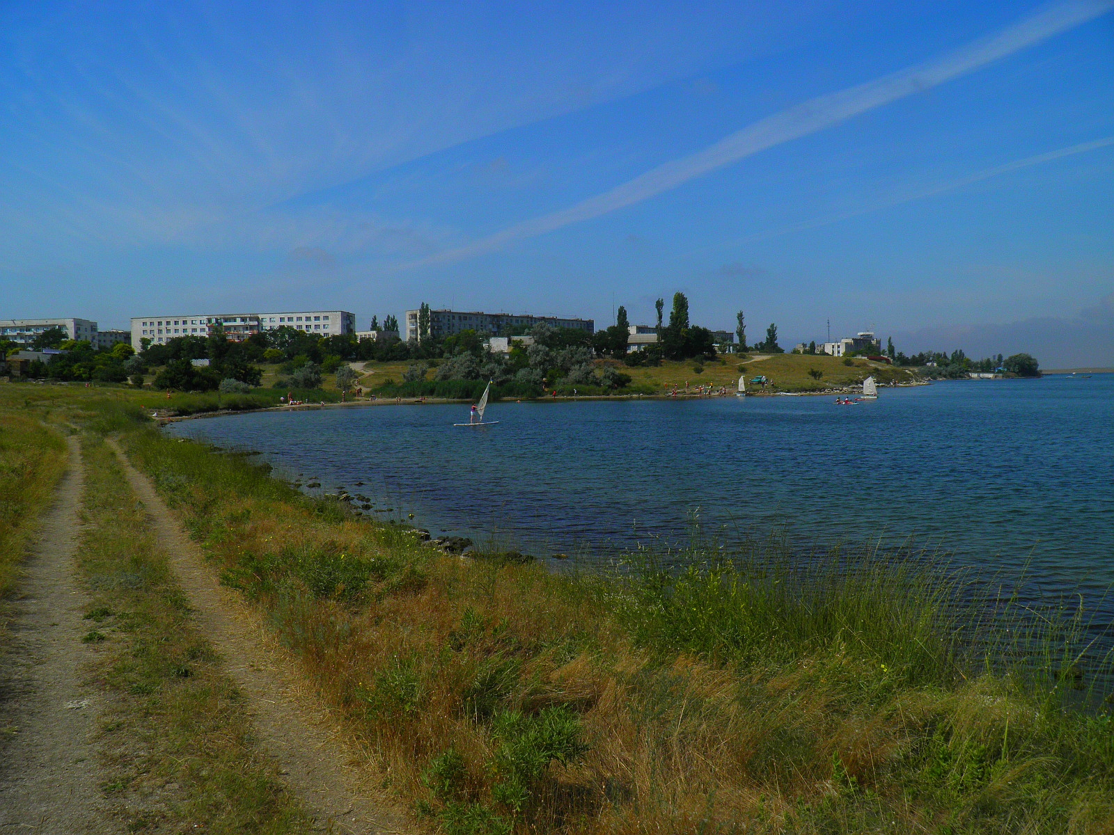 путьСУШИпутьВОДЫпутьНЕБА